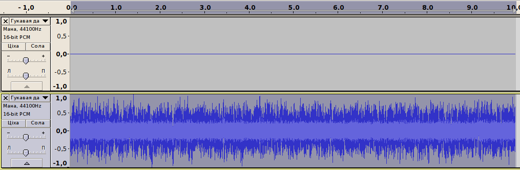 Манафанічныя дарожкі ў рэдактары Audacity. Верхняя - цішыня, ніжняя - ружовы шум